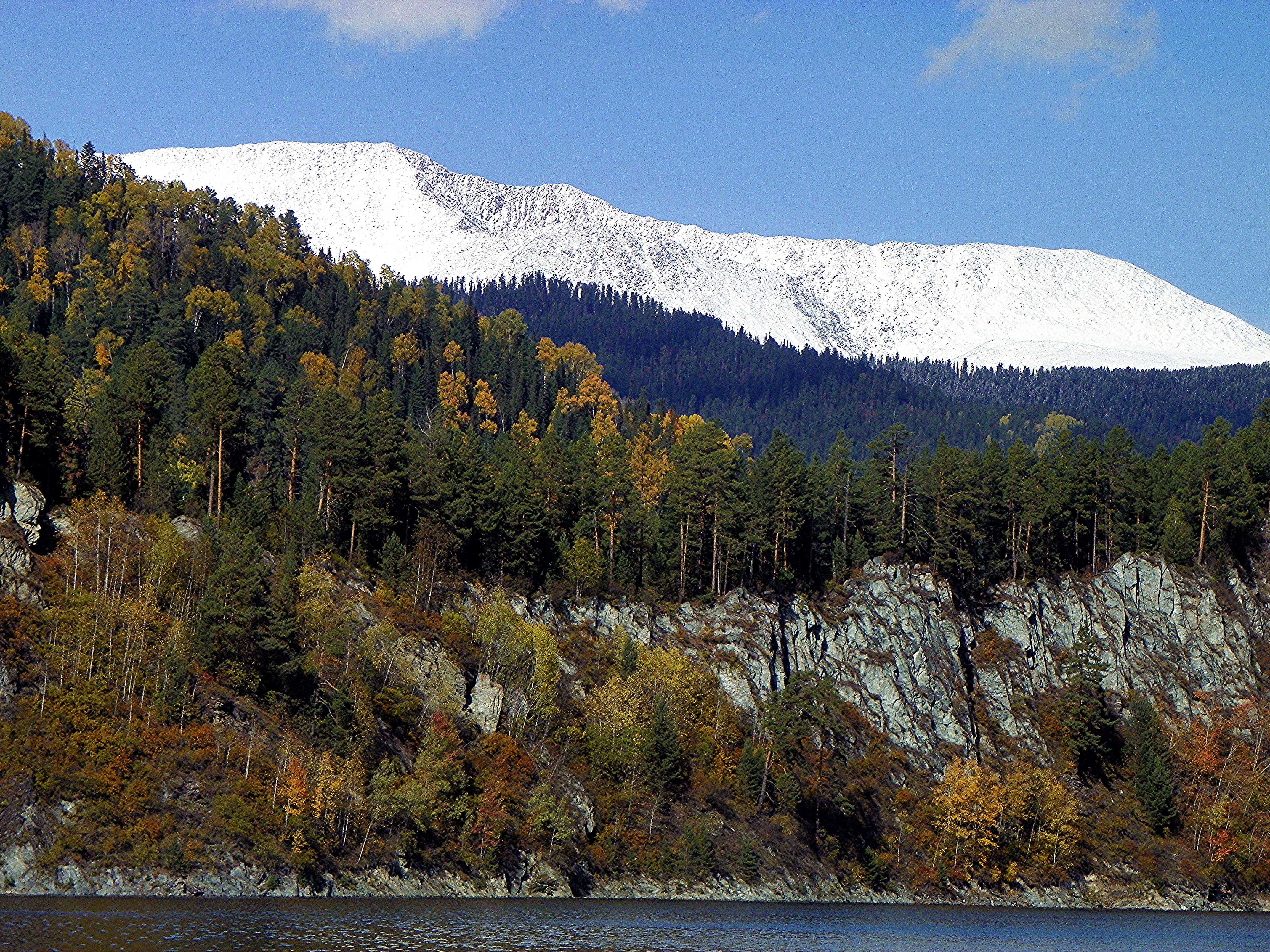 Шушенский бор: Расположен на территории Шушенского района Красноярского края, на правобережье Енисея. Состоит из двух участков - равнинного в Минусинской котловине и горного на северном макросклоне Западного Саяна. Географические координаты крайних точек: Перовское лесничество Север т.1 53°22’ с.ш. 91°59’ в.д. Запад т.2 53°15’ с.ш. 91°55’ в.д. Восток т.3 53°19’ с.ш. 92°03’ в.д. Юг т.4 53°14’ с.ш. 92°00’ в.д. Горное лесничество Север т.5 52°53’ с.ш. 91°26’ в.д. Запад т.6 52°45’ с.ш. 91°23’ в.д. Восток т.7 52°44’ с.ш. 91°46’ в.д. Юг т.8 52°39’ с.ш. 91°29’ в.д,Шушенский район, Красноярский край Фото Элинор Пэйт This image is related to the protected area of Russia number 2400223